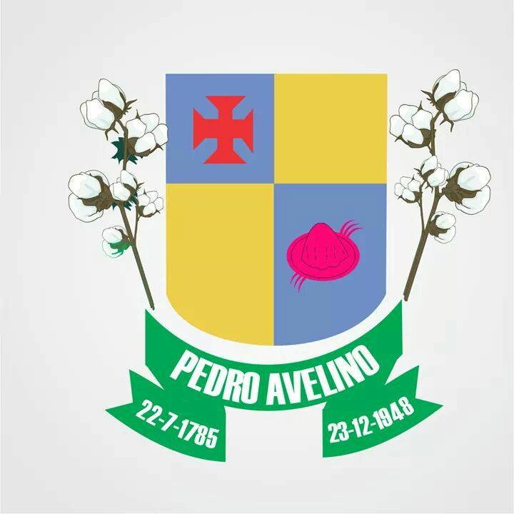 Brasão do Municipio de Pedro Avelino. Fonte: Pagina Oficial do Municipio no Facebook.